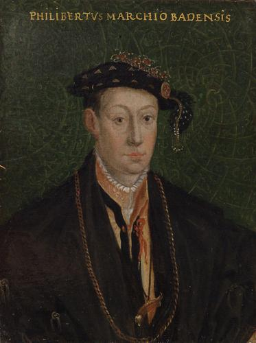 Künstler: anonym Kopie nach: Hans Besser Aachen - nach 1556 Heidelberg Gemälde: Philibert, Markgraf, Sohn Bernhards III., gestorben 1569 s.d. Papier auf Holz 13,4 x 10,3 cm Kunsthistorisches Museum Wien, Gemäldegalerie Inv.-Nr. GG_4823 Abgebildete Person: Markgraf Philibert Sohn d. Bernhard III. von Baden